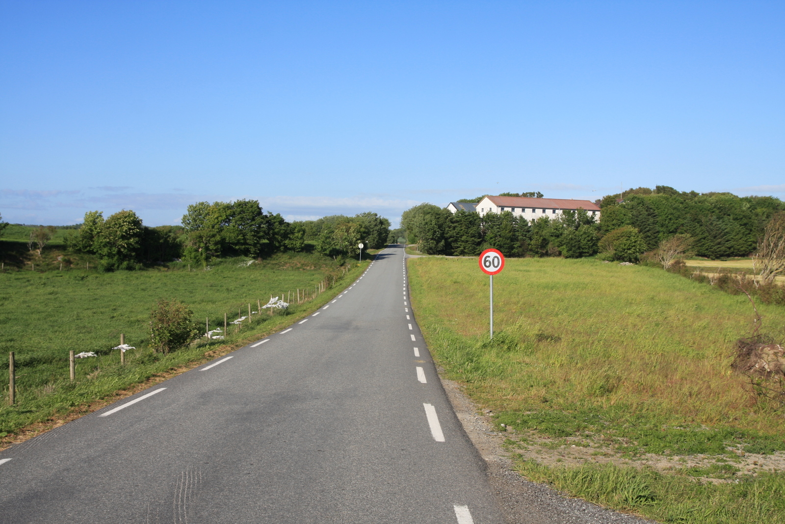 Fylkesvei 249 Nesevegen